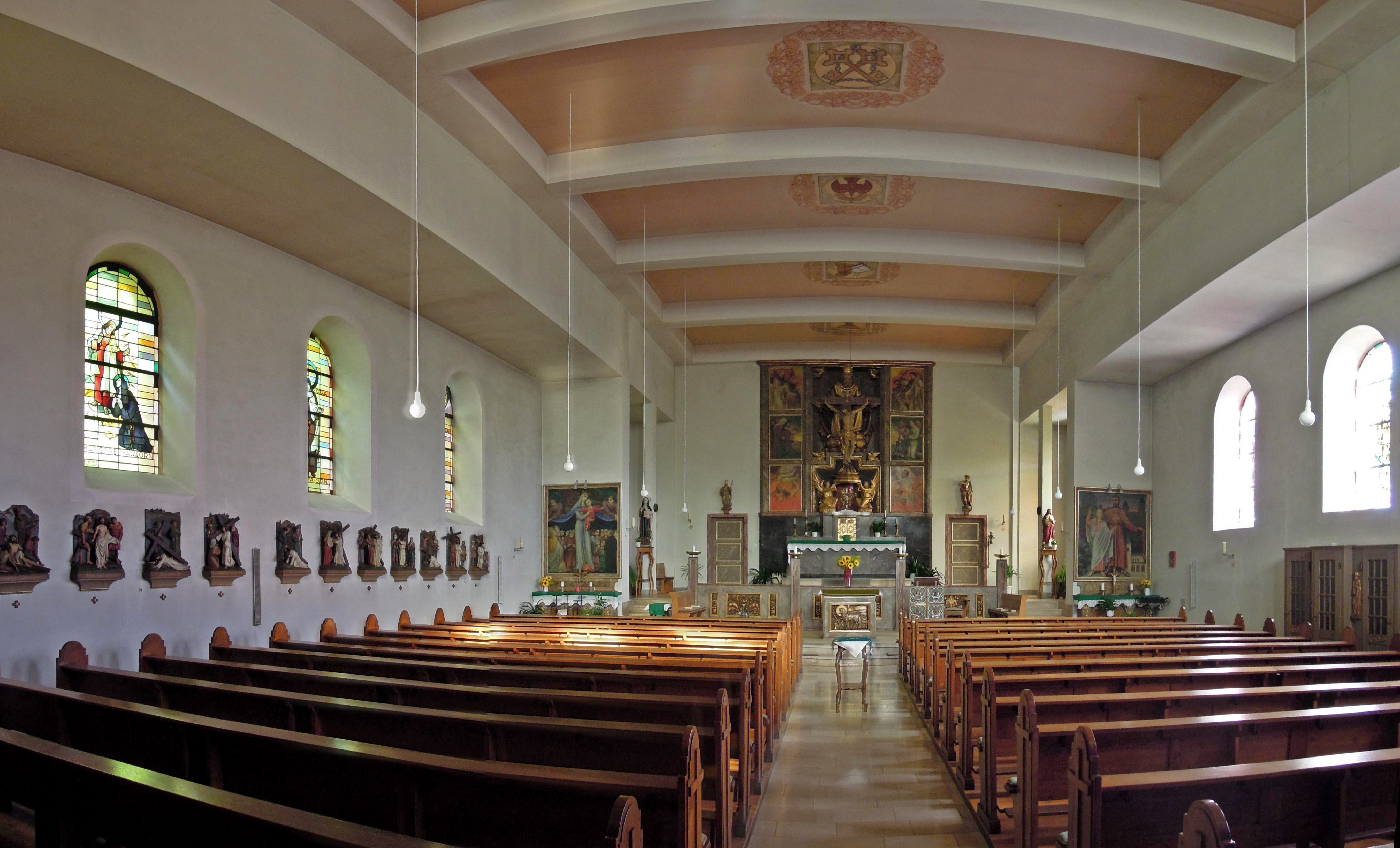 Kloppstraße, kath. Pfarrkirche St. Nikolaus (Einzeldenkmal)